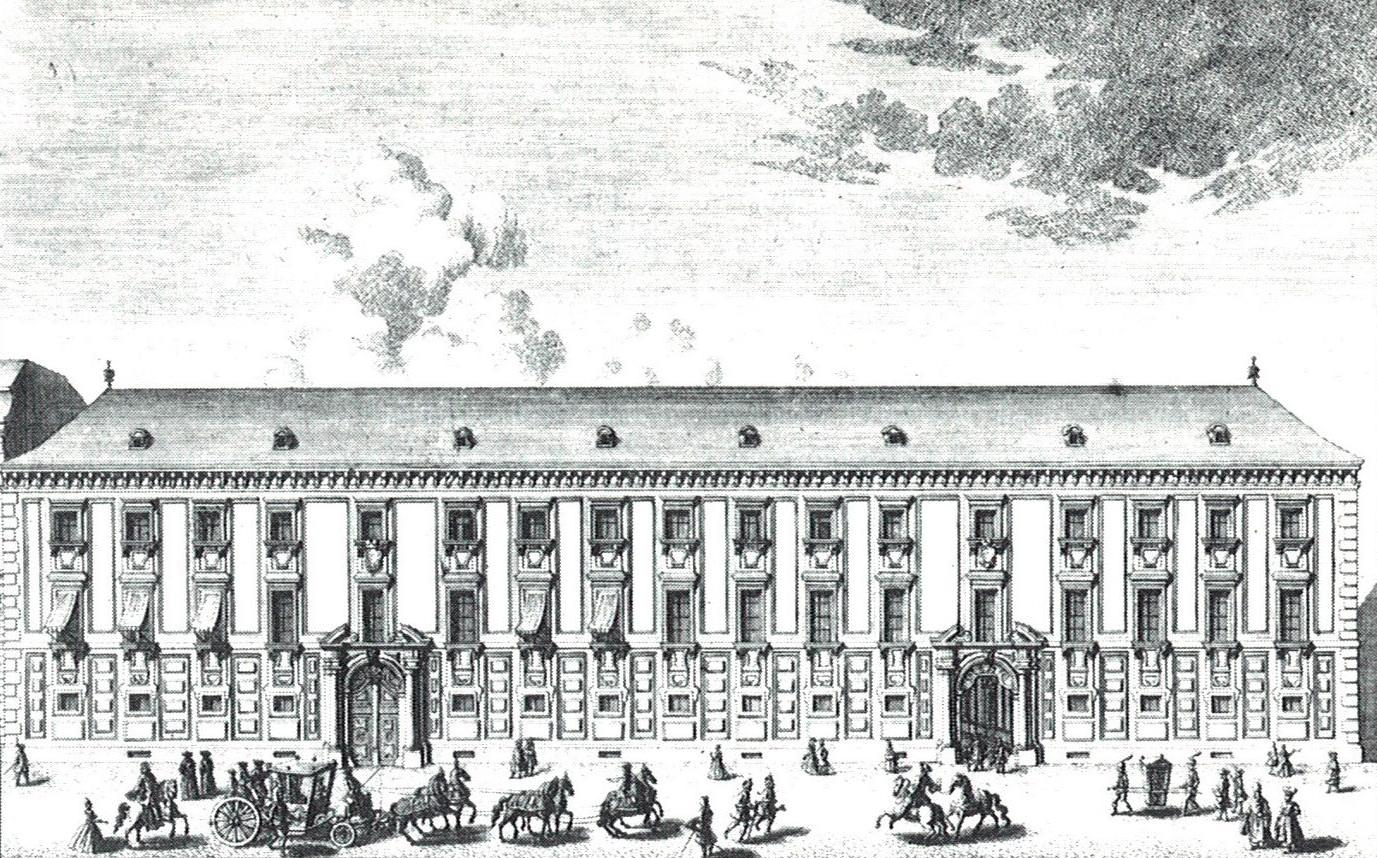 The Palais Liechtenstein in Vienna's I. district Innere Stadt (Vienna) at Herrengasse #6-8.